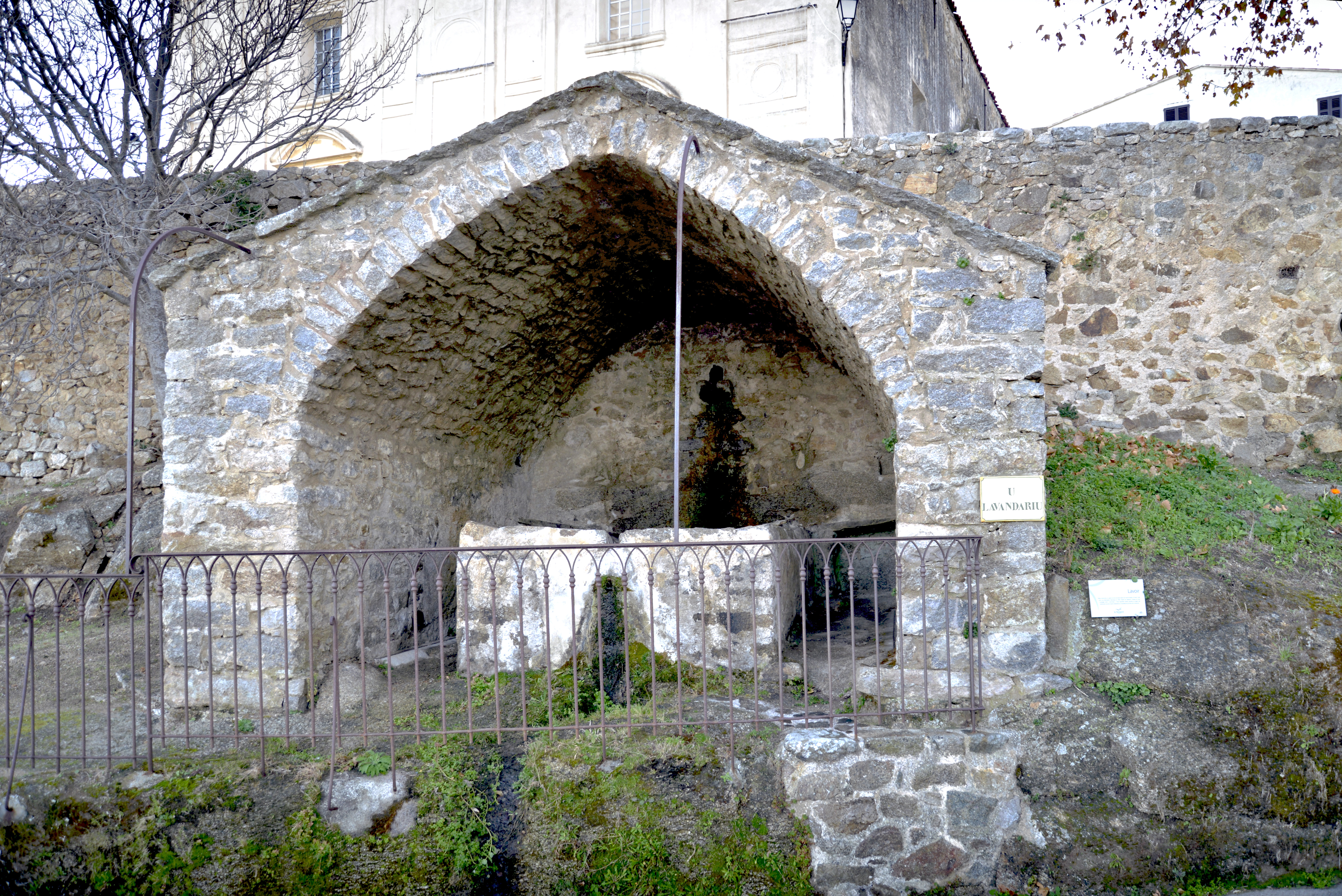 Lavatoggio, Balagne (Haute-Corse) - Le lavoir (u lavandariu), daté du Second Empire, inscrit au titre des Monuments historiqques depuis 1987.